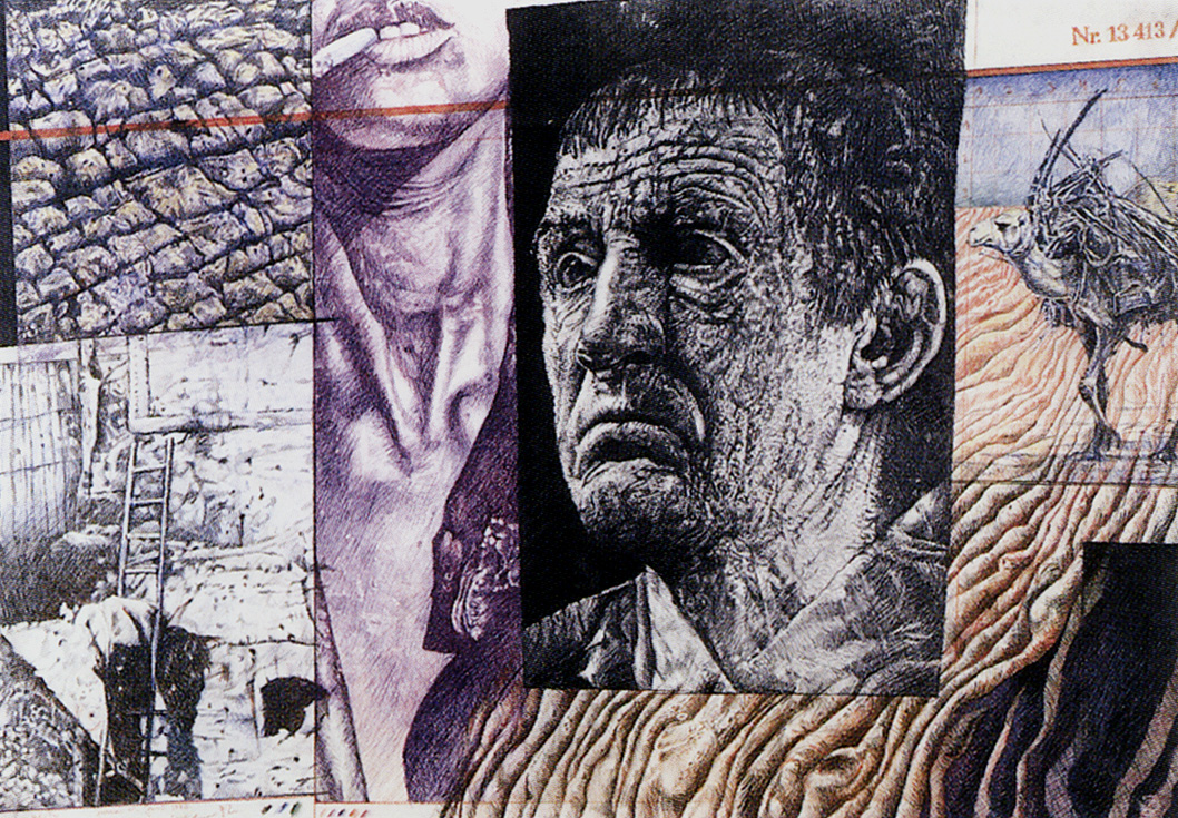 Peter Sorge, Häute, 1992, Farb- und Graphitstift auf Karton, 70 x 102 cm